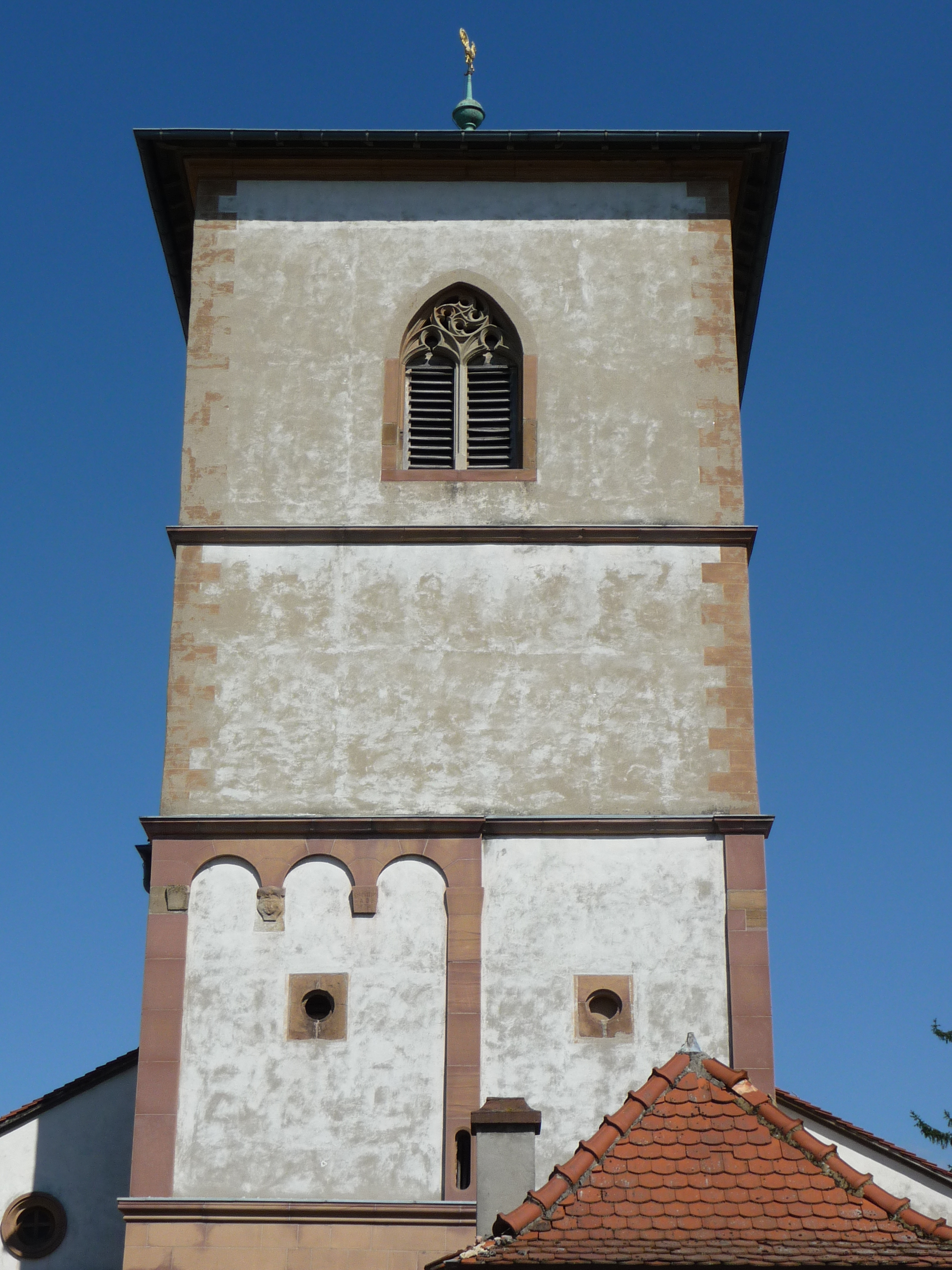 Die katholische Pfarrkirche St. Lambert ist ein denkmalgeschütztes Kirchengebäude in Bechtheim, Rheinland-Pfalz.